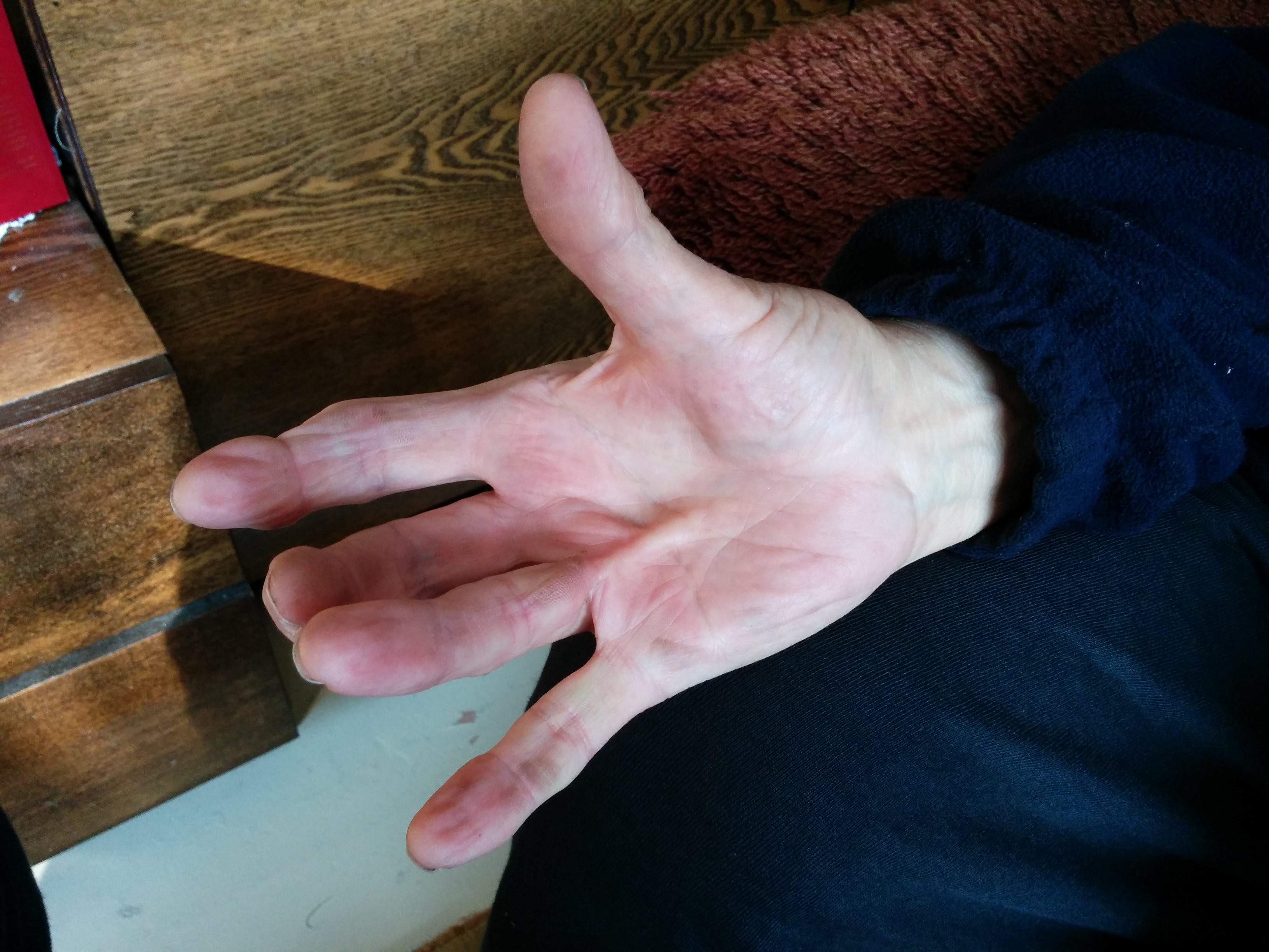 Dupuytren’i kontraktuur parema käe nimeta sõrmel